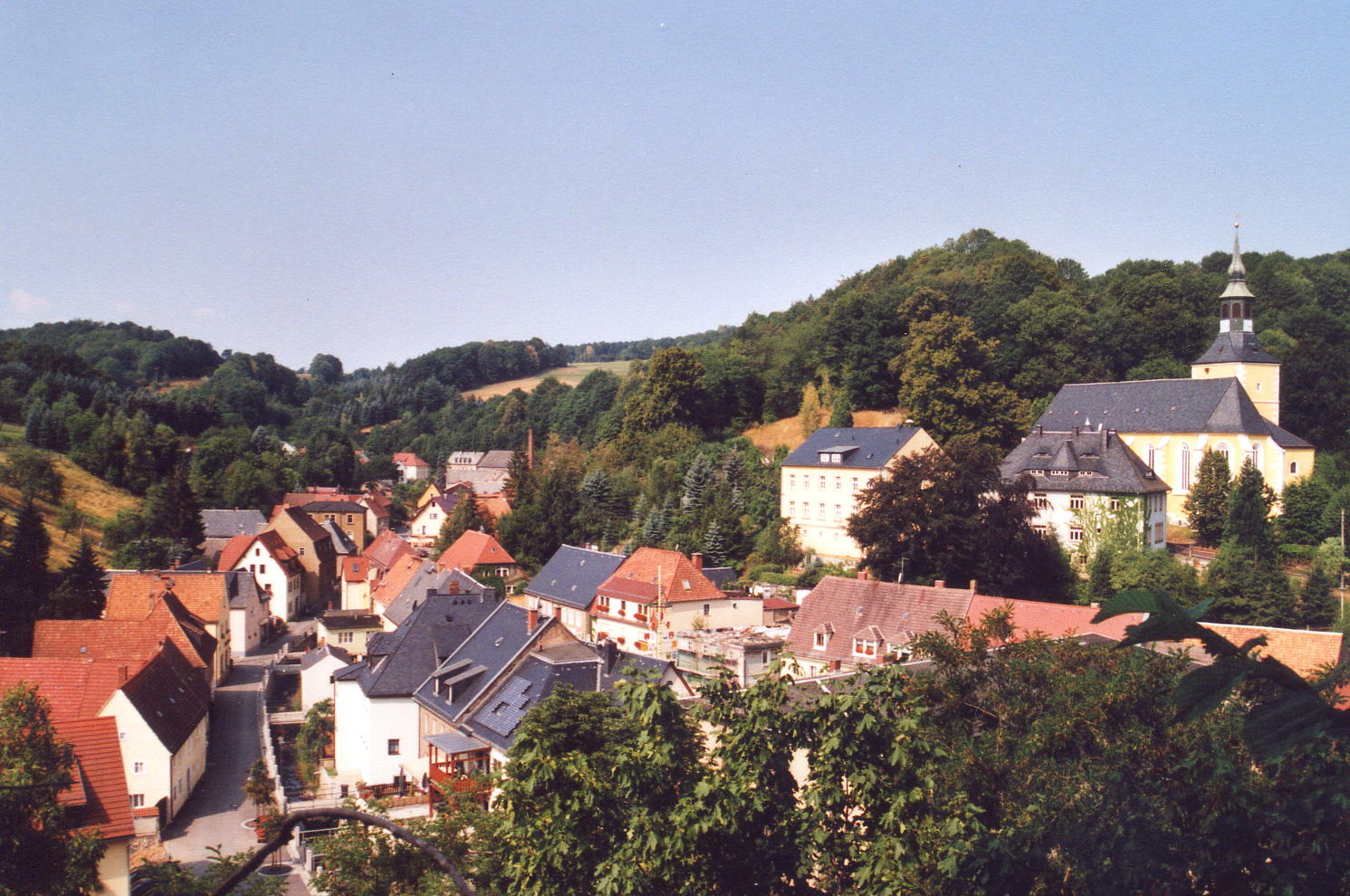 Liebstadt: Blick von Schloss Kuckuckstein auf die Stadt - Denkmalschutzgebiet Liebstadt.